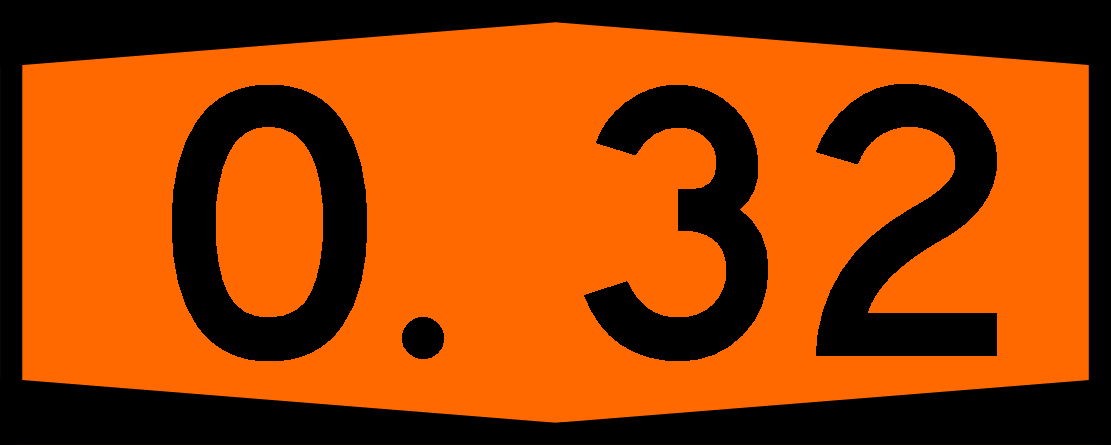 Otoyolu 32